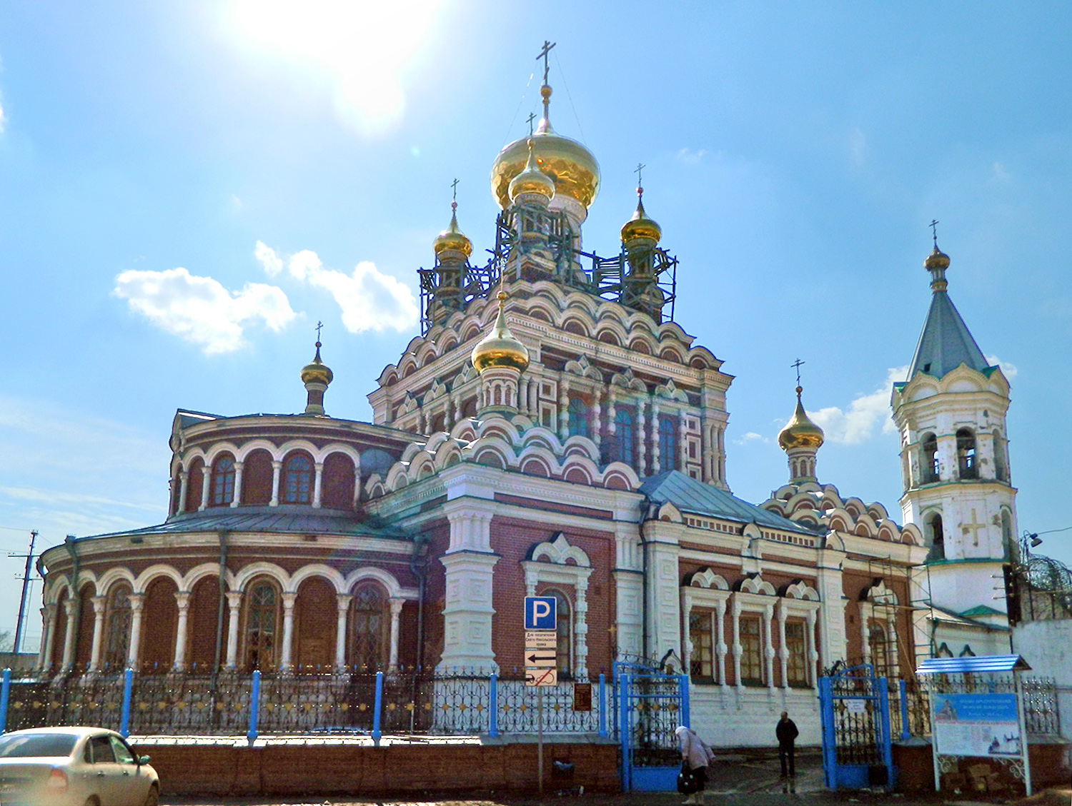 Свято-Никольский храм в Кунгуре